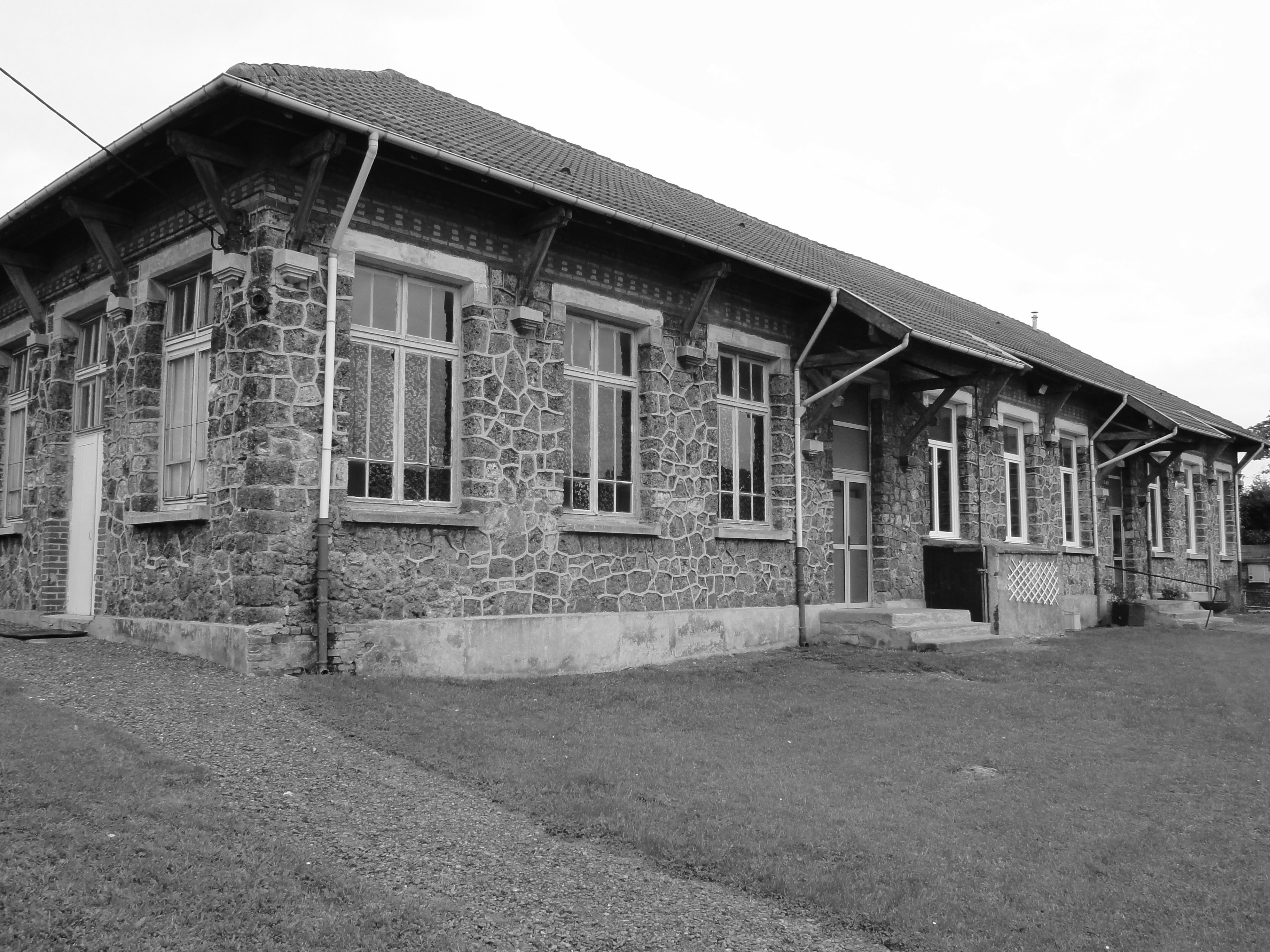 Salle d'œuvres paroissiales Saint-Pierre des cités de la Fosse n° 11 - 19 de la Compagnie des mines de Lens, Lens, Pas-de-Calais, Nord-Pas-de-Calais, France. .